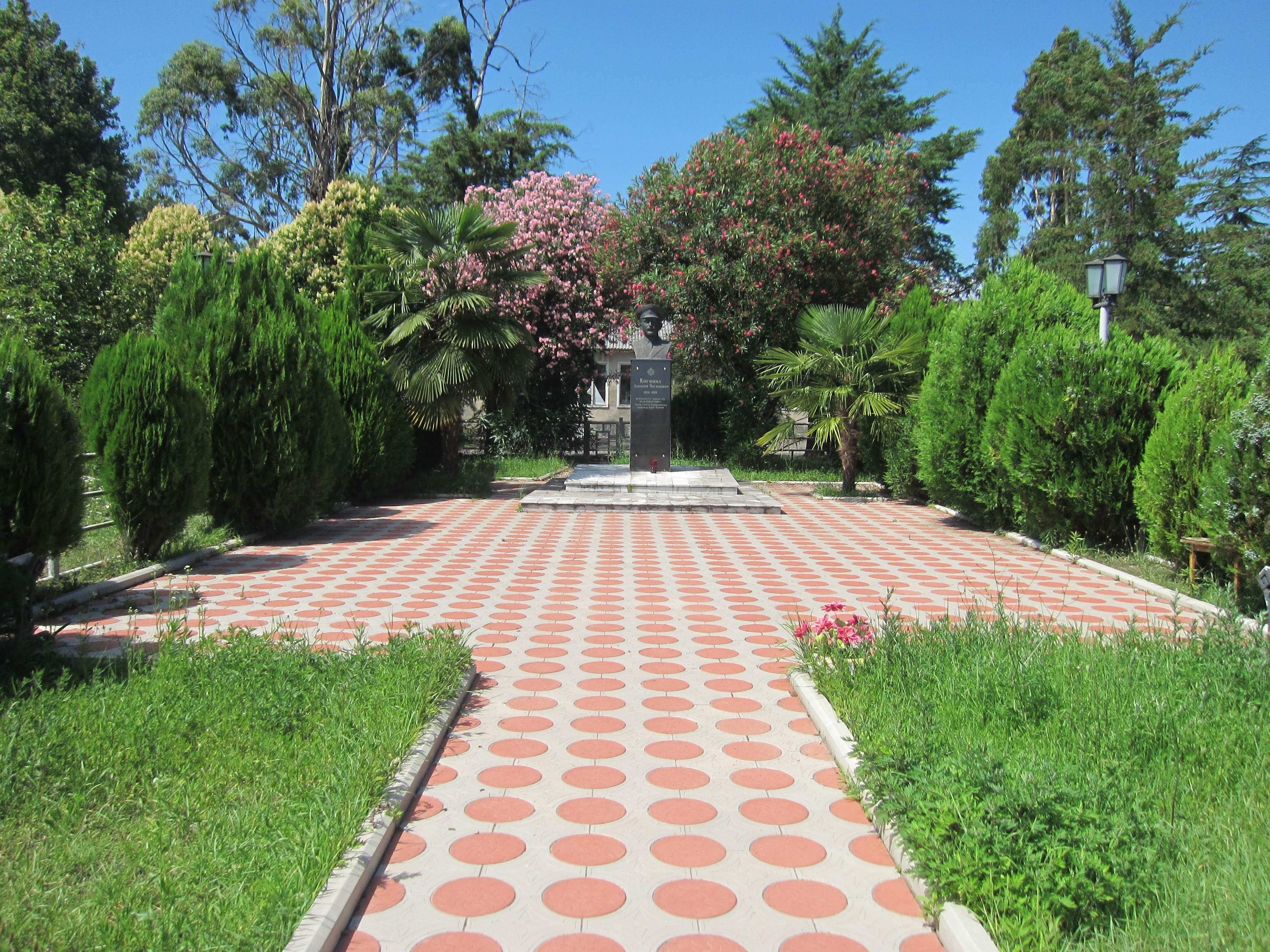 Мемориал Алексею Когониа (комендант Сухукмского аэропорта), установленный на месте его убийства в 1989 году